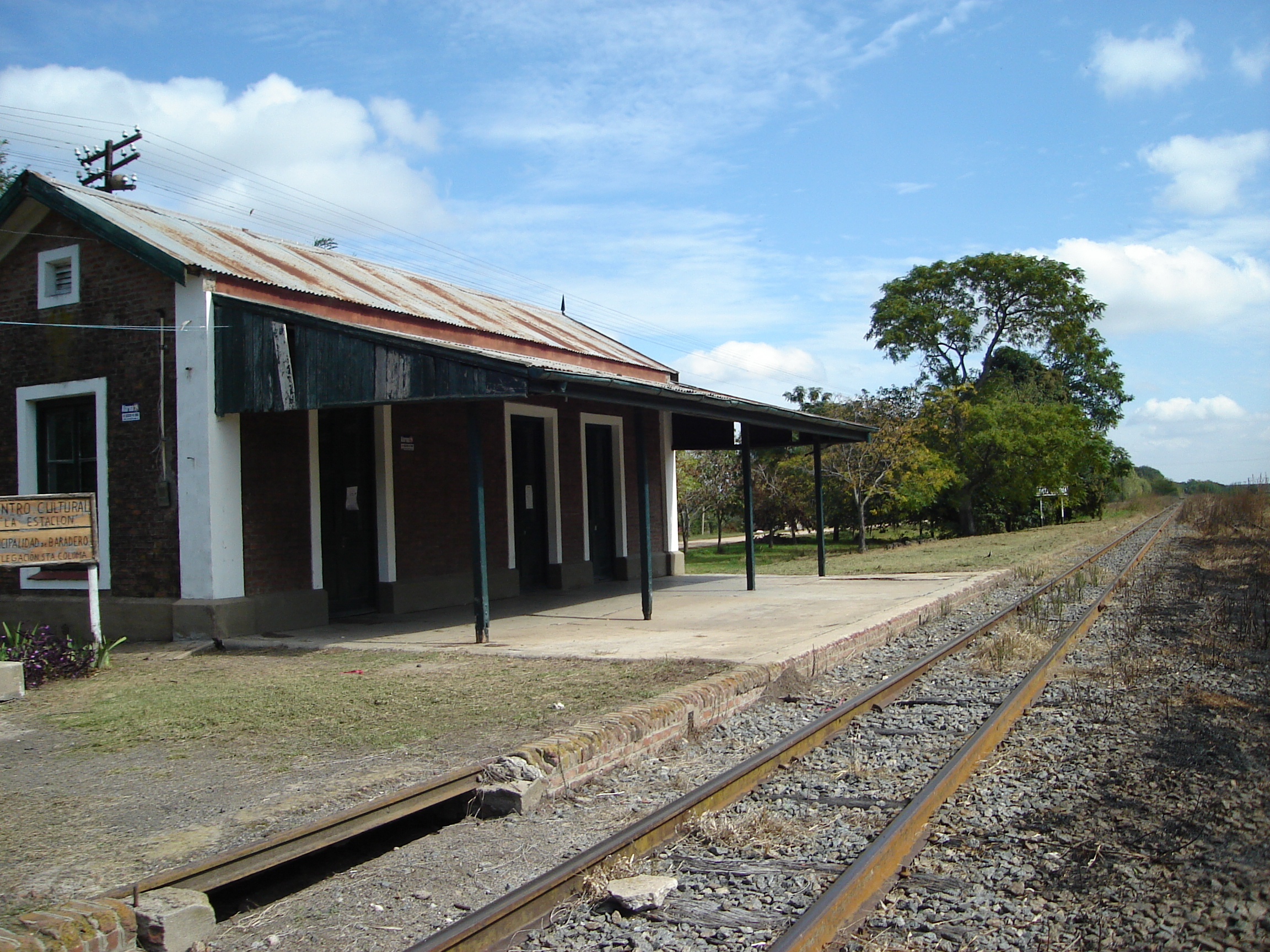 Galería completa en: .ar/galeria/viajes/buenos-aires/san...